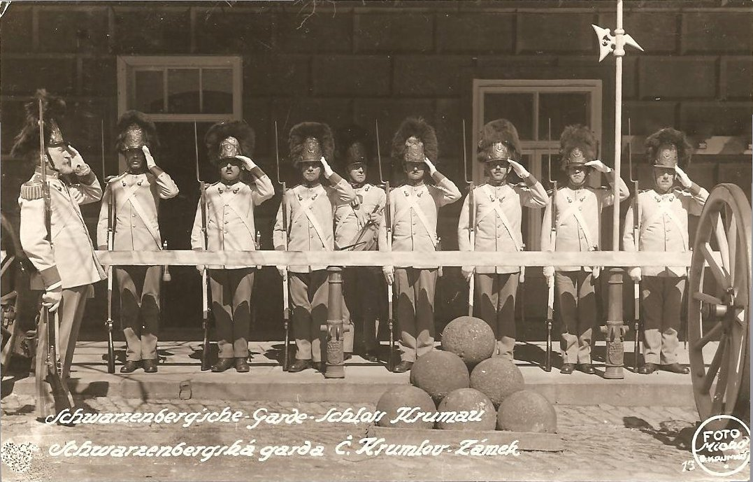 Schwarzenberská granátnická garda 5